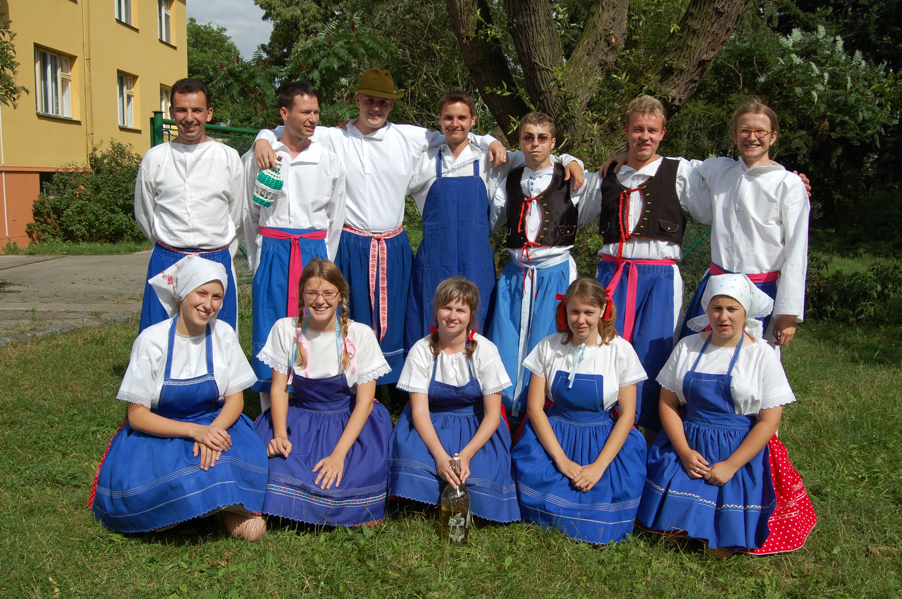 Část členů souboru před vystoupením